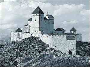 Ideová rek. južný pohľad